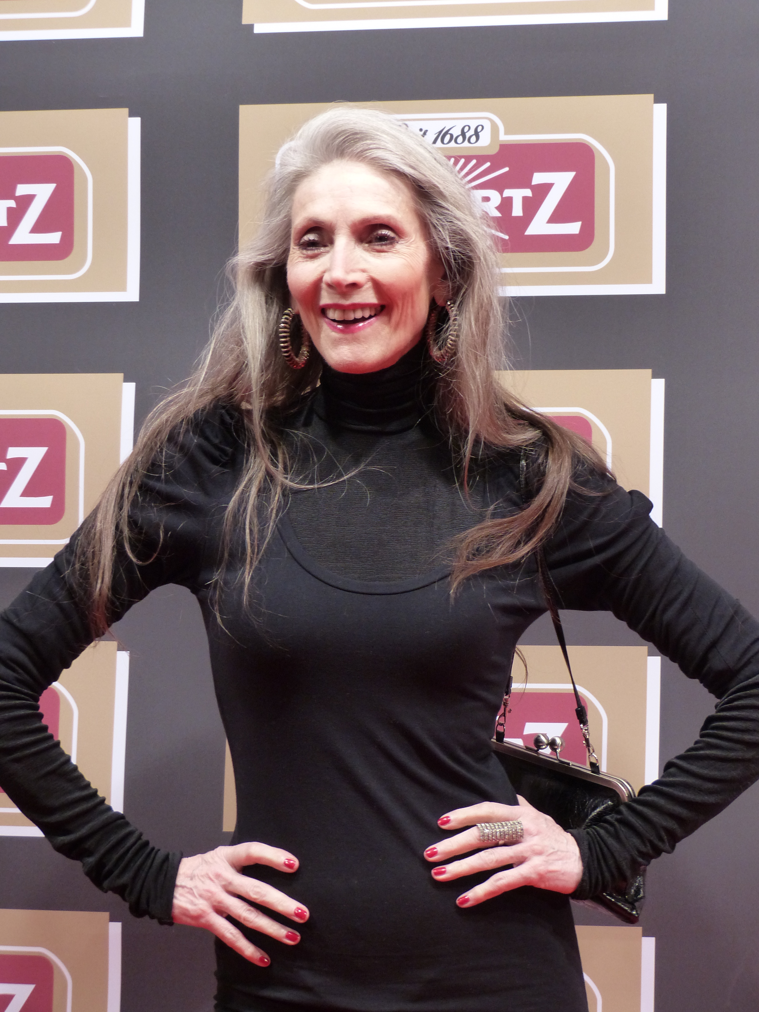 Eveline Hall bei der Lambertz Monday Night, im Februar 2016.